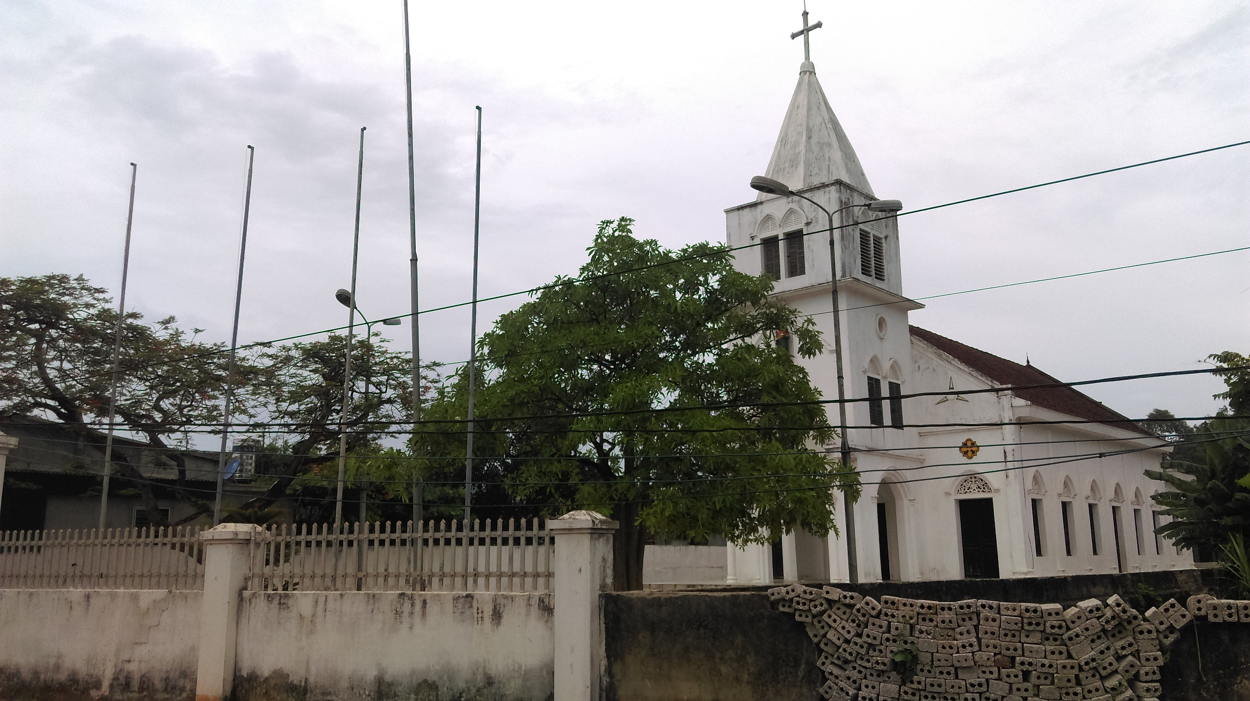 Nhà thờ Lộc Mỹ, Nghi Quang, Nghi Lộc, Nghệ An